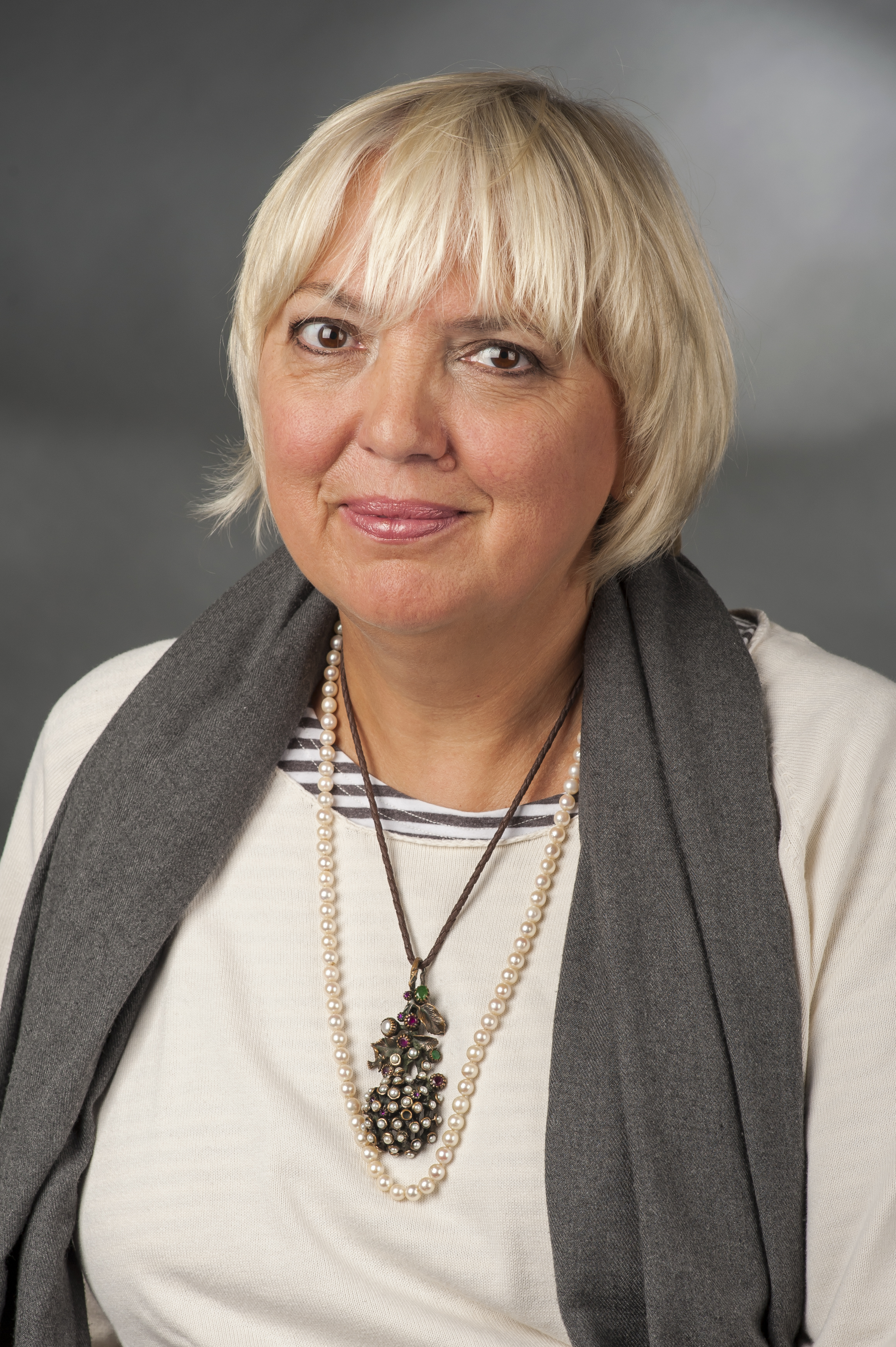 Claudia Roth (* 15. Mai 1955 in Ulm) ist eine deutsche Politikerin und war von 2001 bis 2002 sowie von 2004 bis 2013 eine von zwei Bundesvorsitzenden der Partei Bündnis 90/Die Grünen, 2008 bis 2013 neben Cem Özdemir. Seit dem 22. Oktober 2013 ist sie Vizepräsidentin des Deutschen Bundestages.